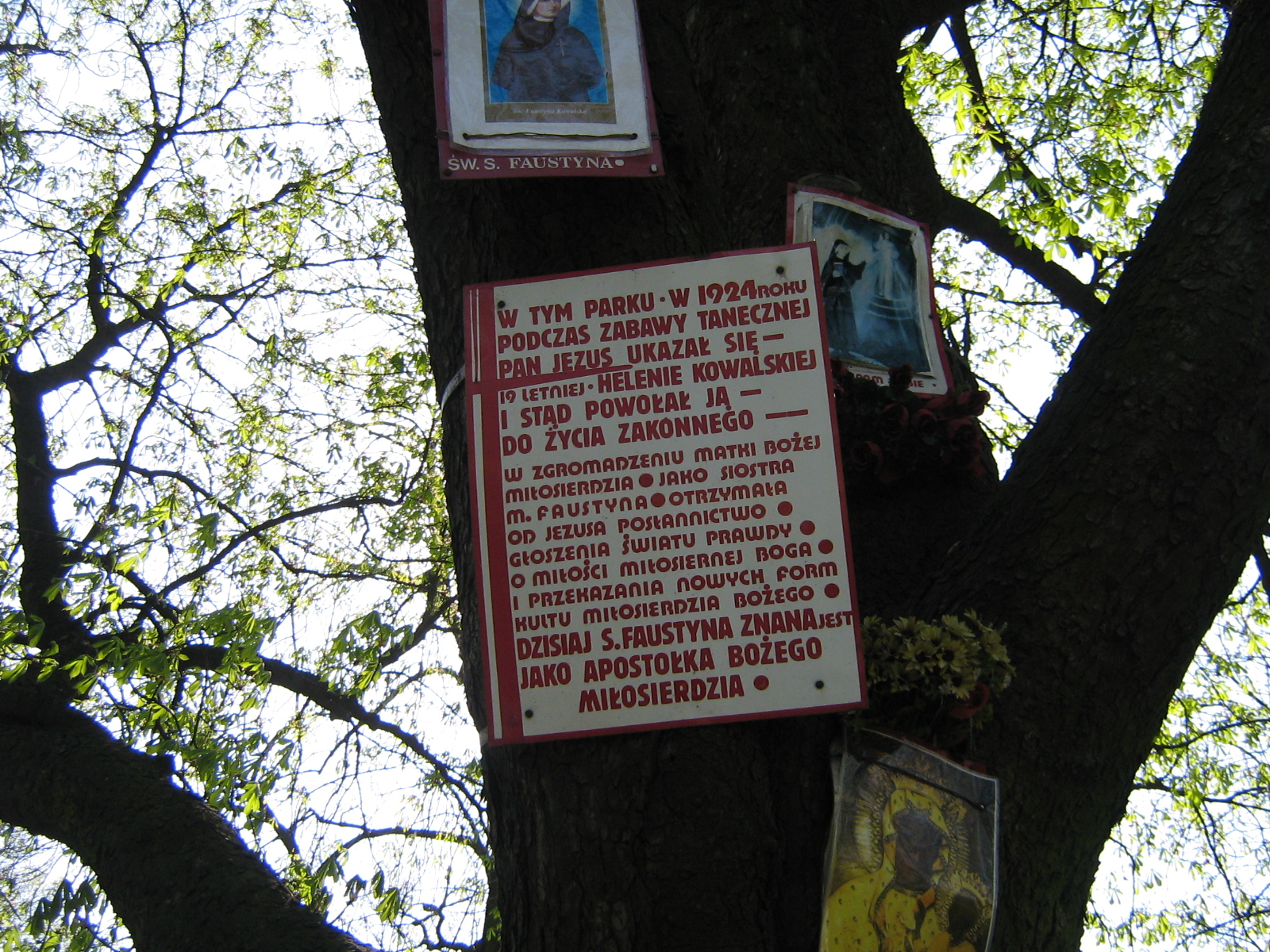 Park im. J. Słowackiego Łódź - tabliczka z informacją o objawieniach, jakie doznała w parku w 1924 roku Faustyna Kowalska